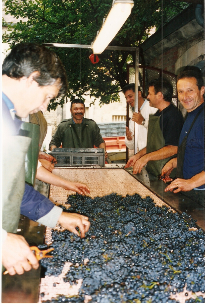 Romanée-Conti selecting grapes (seleção)